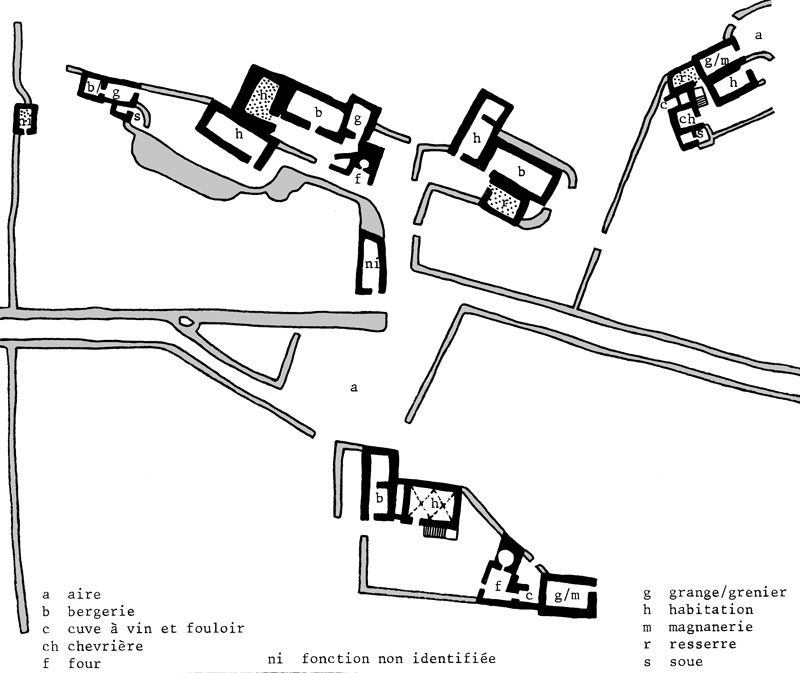 Plan du site muséologique dit "le Village des Bories", d'après Pierre Viala. Les constructions dans lesquelles des pointillés ont été ajoutés sont celles qui ne semblent pas figurer sur le cadastre de 1809.